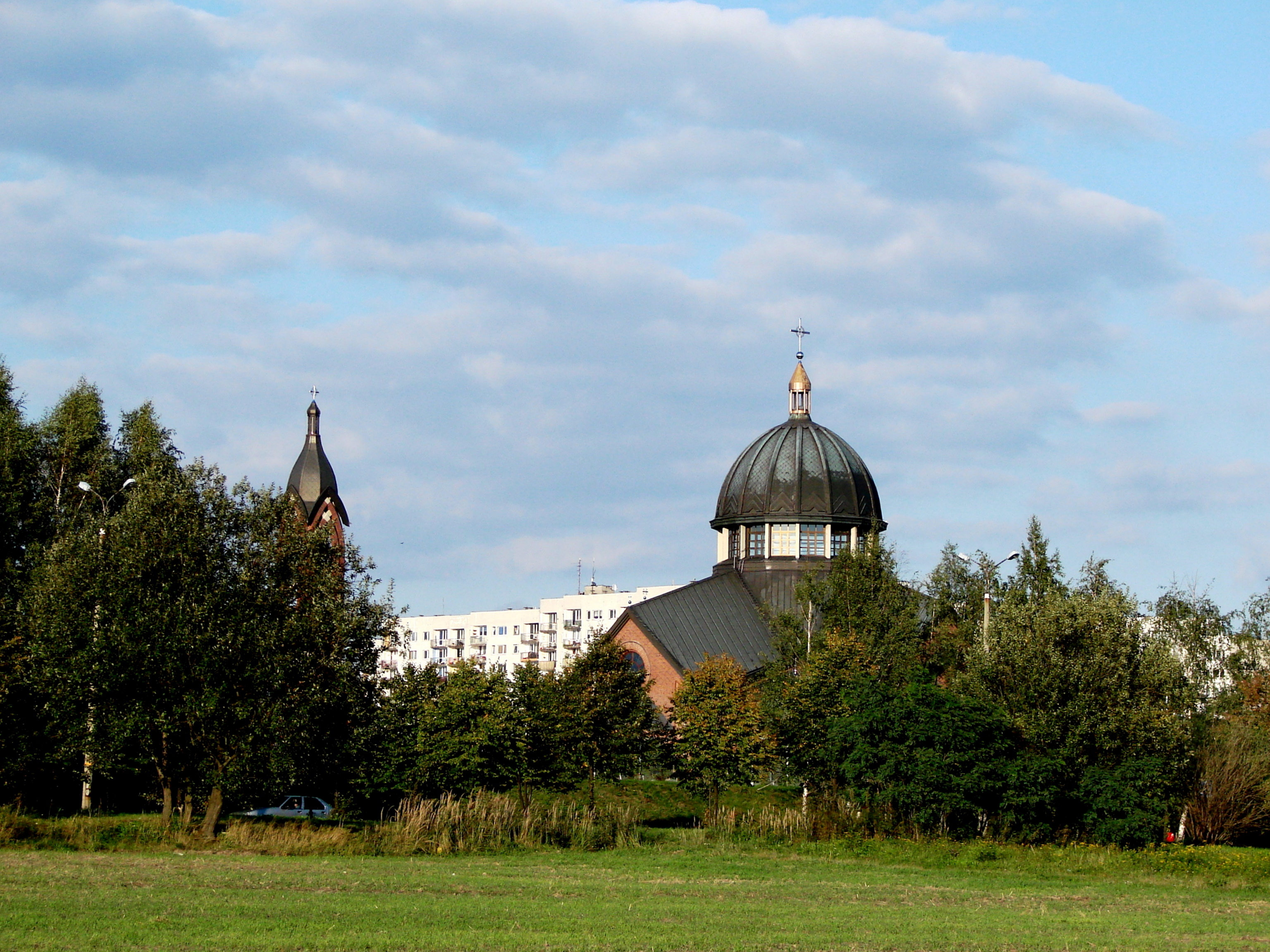 rzymskokatolicka parafia w dekanacie Tychy Nowe w archidiecezji katowickiej.